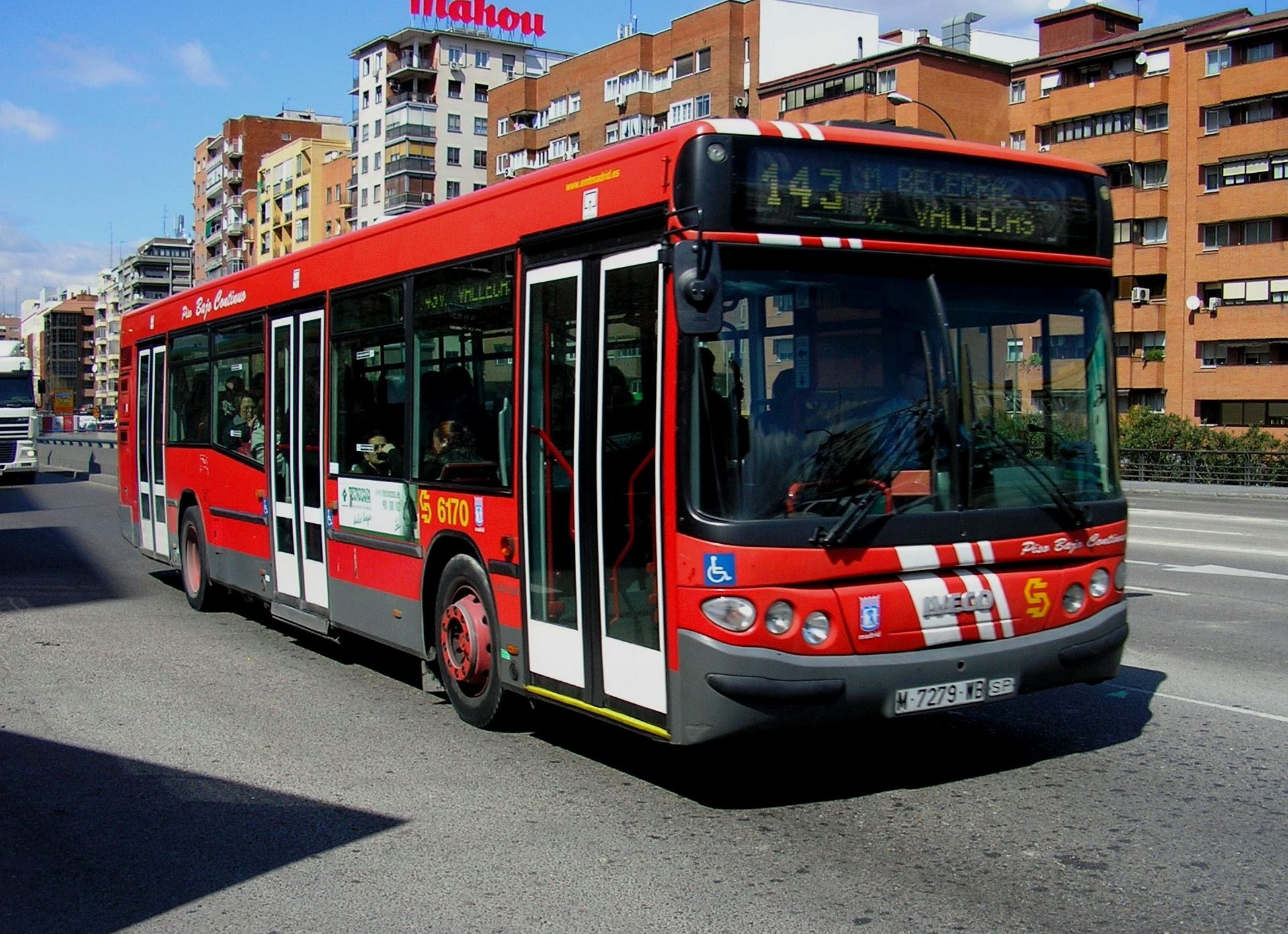 EMT 6170